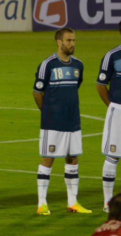 Rodrigo Palacio - Uruguay vs Argentina - Partido de eliminatorias Mundial Brasil 2014